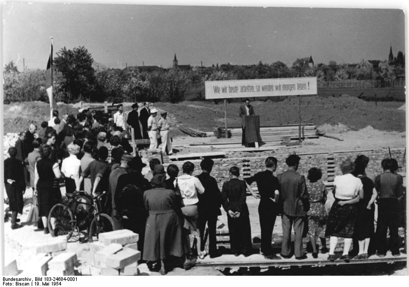 LPG Sabke, Grundsteinlegung Zentralbild Bissan Re.-19.5.1954 Die LPG "Freie Erde" in Magdeburg-Salbke hat mit dem Bau eines großen zentralen Wirtschaftshofes begonnen, der nach den neuesten Erkenntnissen der Landwirtschaft angelegt ist. Den Grundstein haben die Genossenschaftsbauern gemeinsam mit Arbeitern der benachbarten Industriebetriebe gelegt. UBz: Die Genossenschaftsbauern der LPG "Freie Erde" und Vertreter der benachbarten Betriebe, die ihnen bei ihrem Bauvorhaben Hilfe leisten werden, sind zur Grundsteinlegung zusammengekommen. Am Rednerpult: Der 1. Vorsitzende der LPG, Werner Stein.